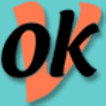 Logo des OKV